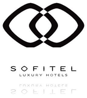 Sofitel hôtel logo